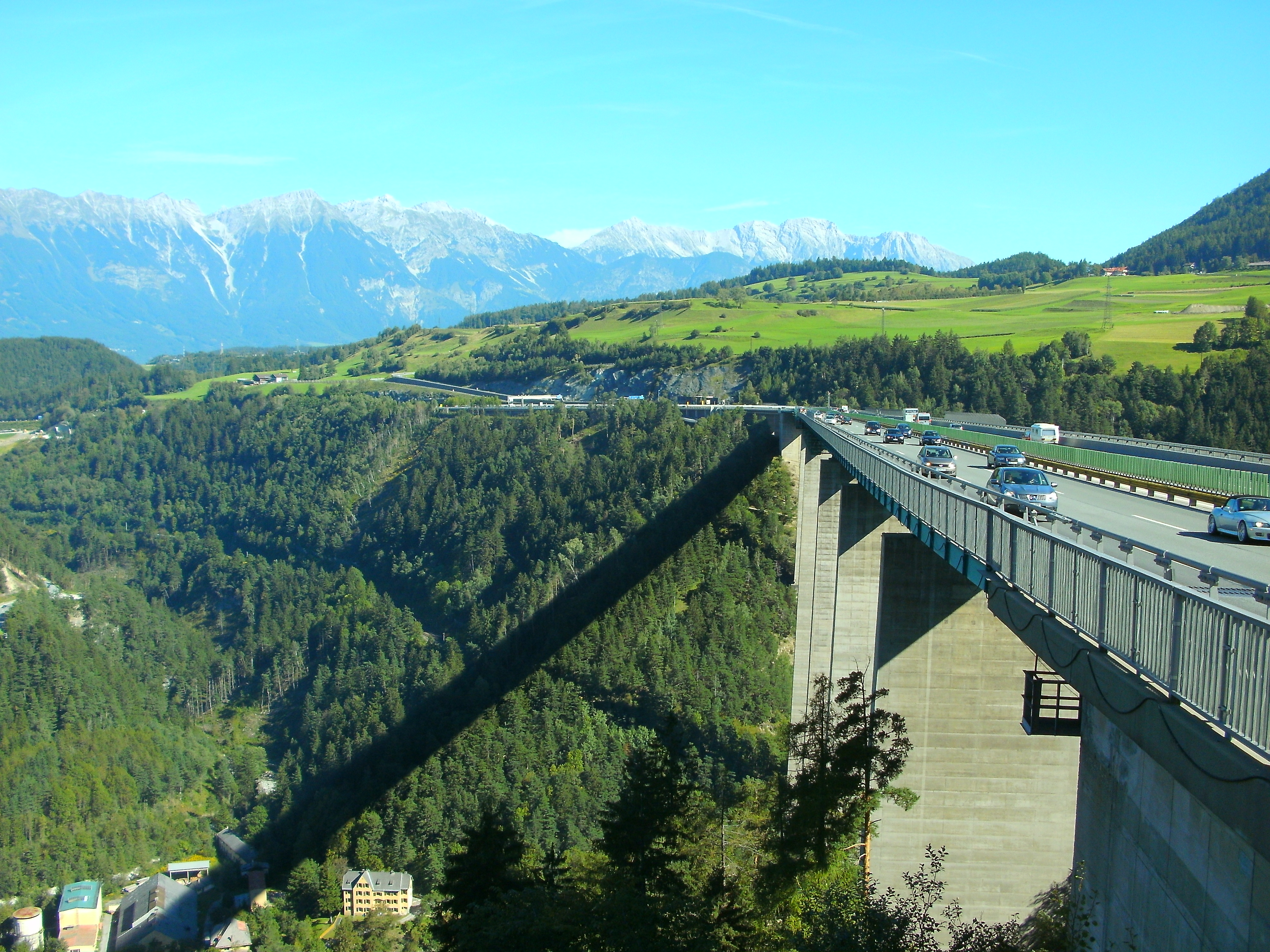 Europabrücke